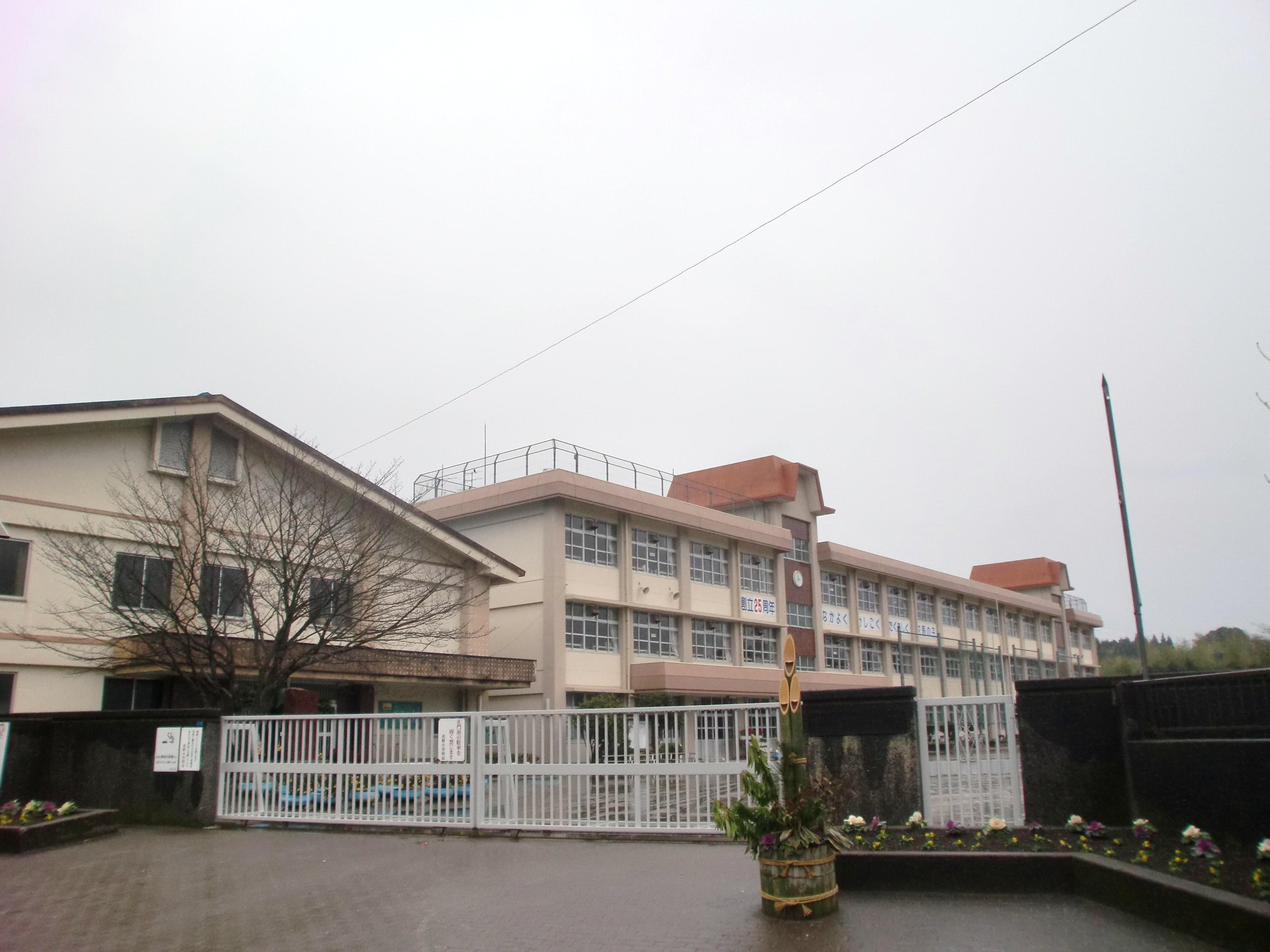 鹿児島市立花野小学校の外観。